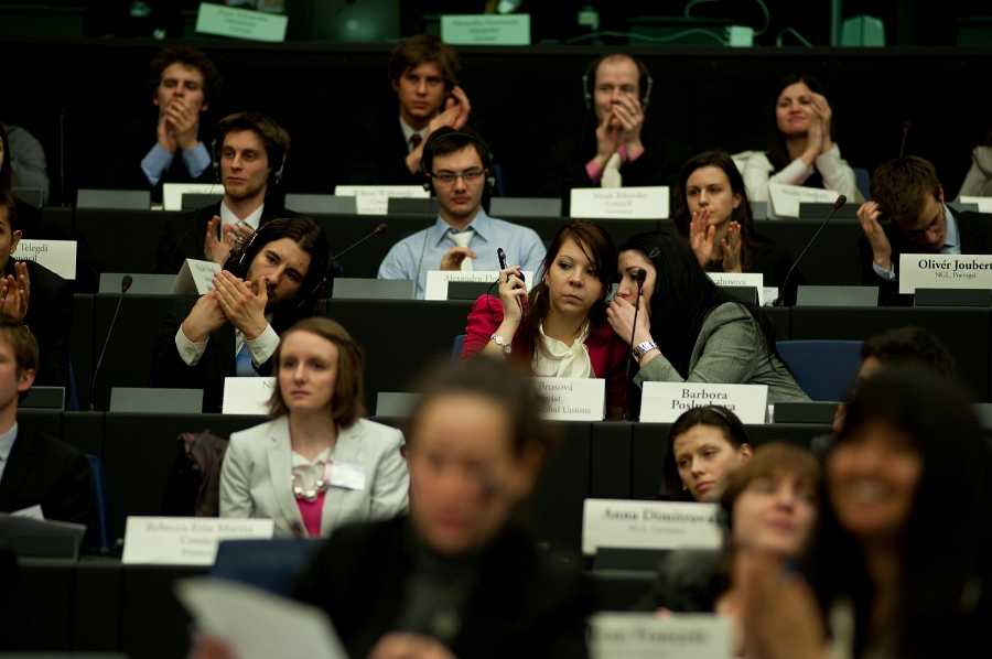 MEU 2011 - posłowie do PE